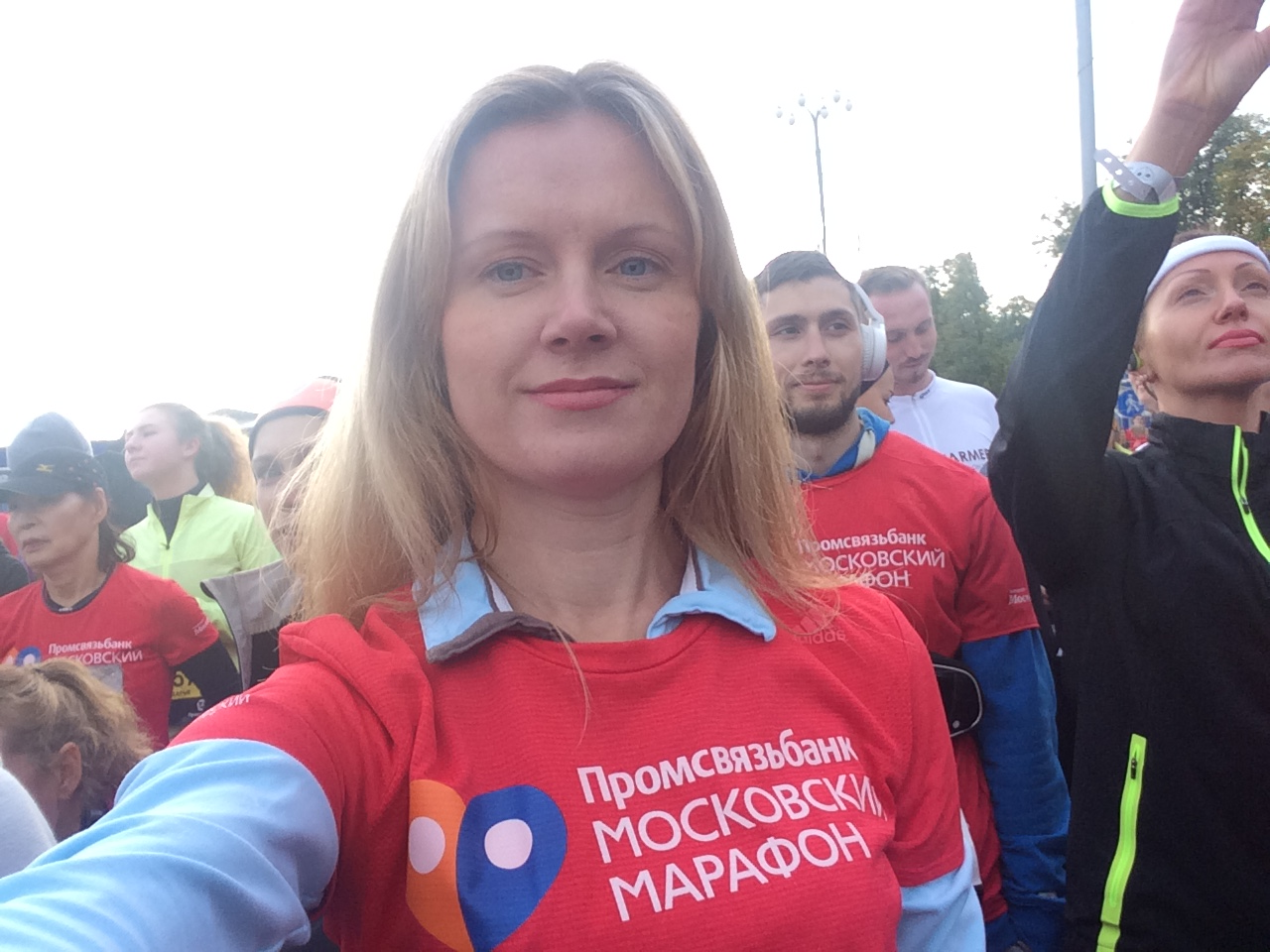 Стартовый коридор IV Московский марафон 25 сентября 2016 года рядом со стадионом Лужники